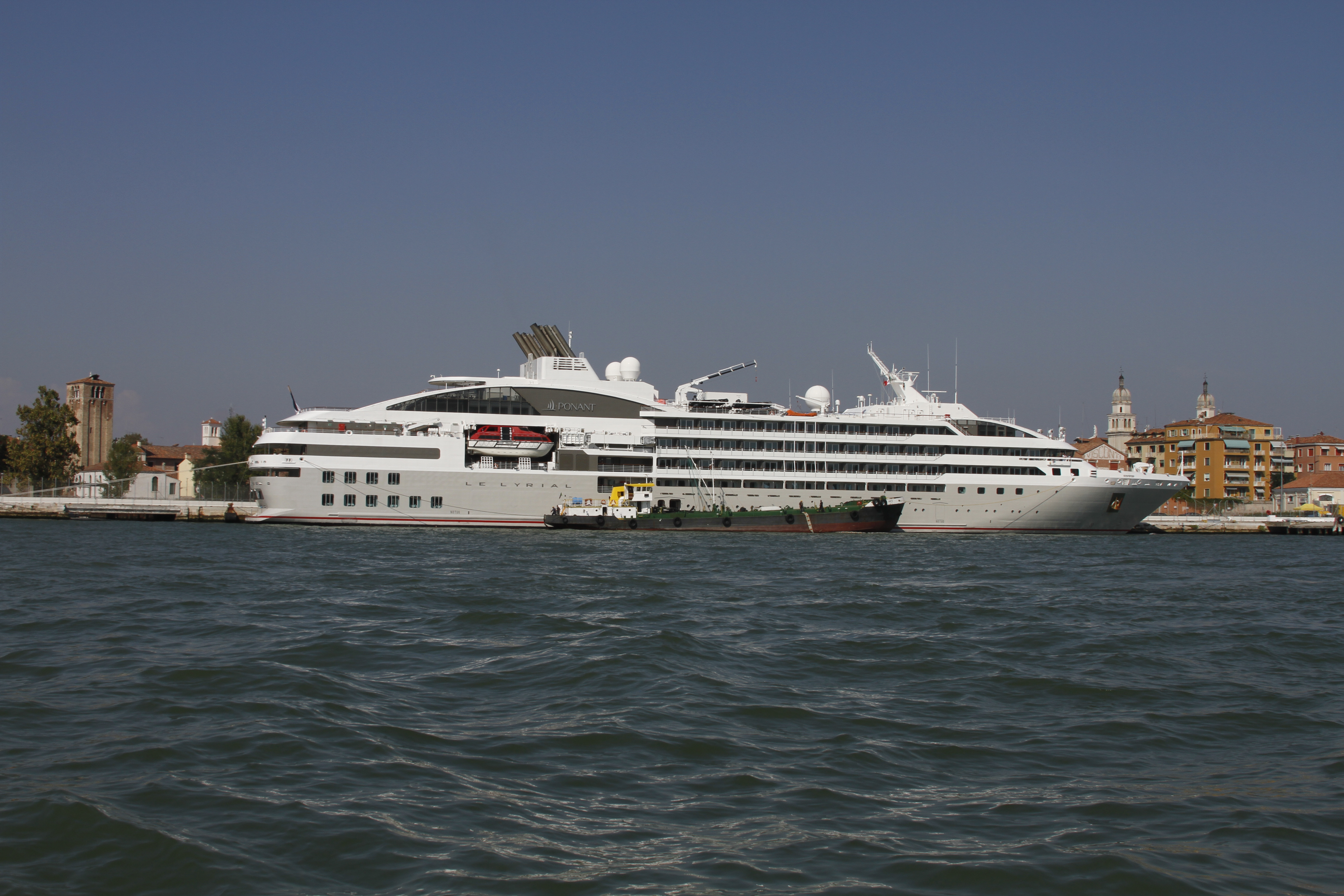 Ship Le Lyrial in September 2016 in Venice